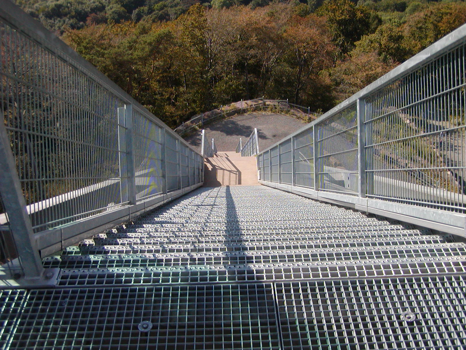 Blick Treppe hinab